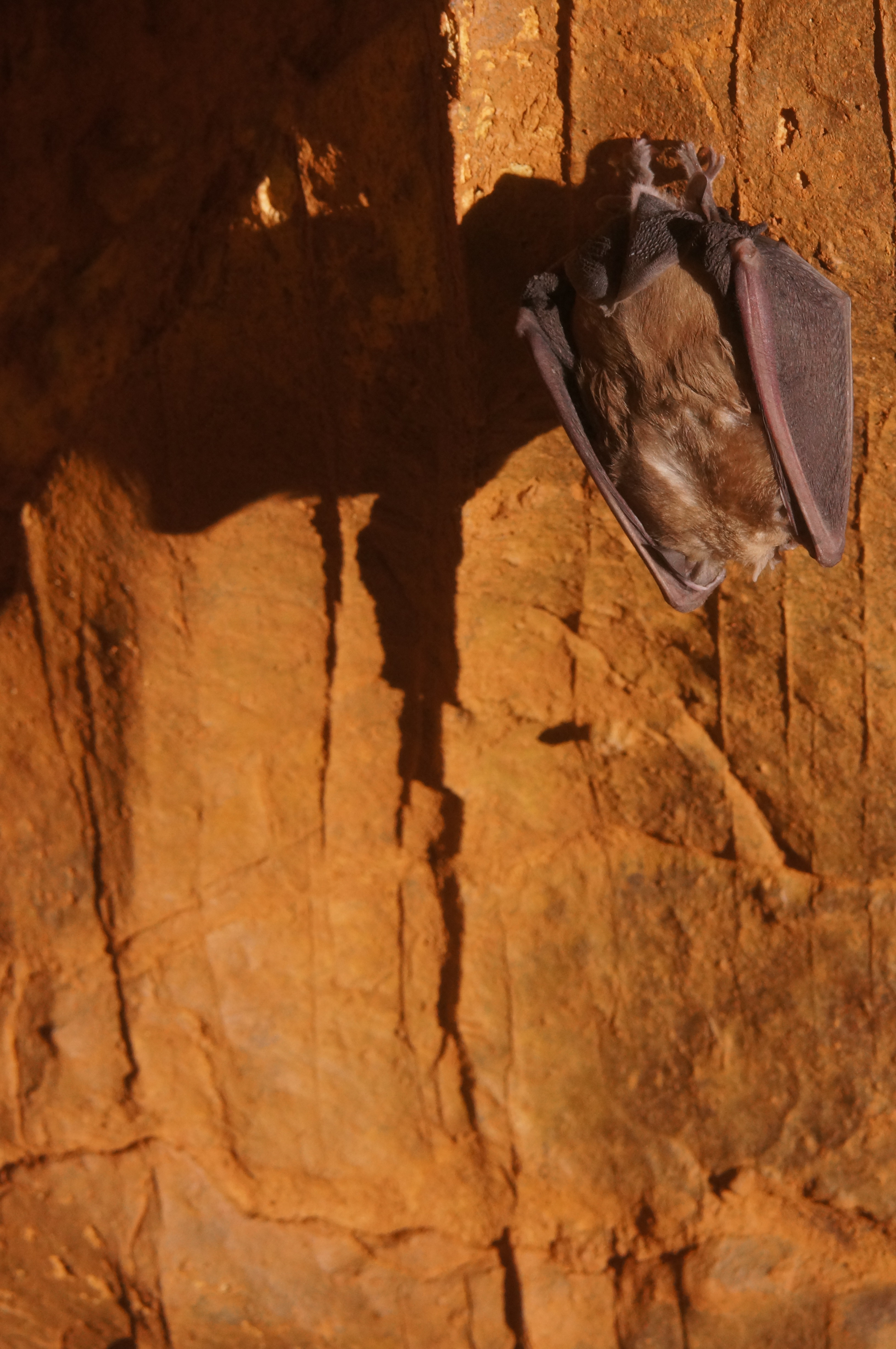 Foto di L. Tringali, un pipistrello durante il letargo nella Galleria della Speranza, parte terminale della Grotta Regina.